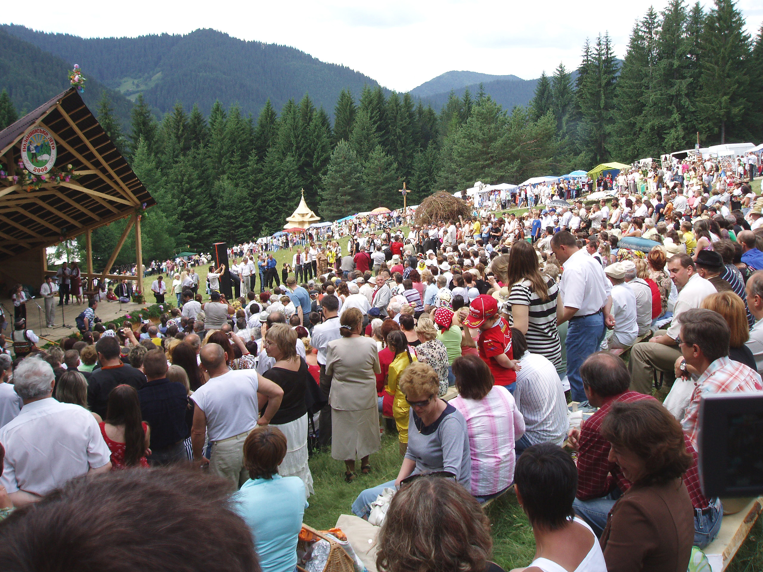 Изображение Гуцульский фольклорный фестиваль "Проводы на полонину" поблизости Криворивни 29 июня 2008 года